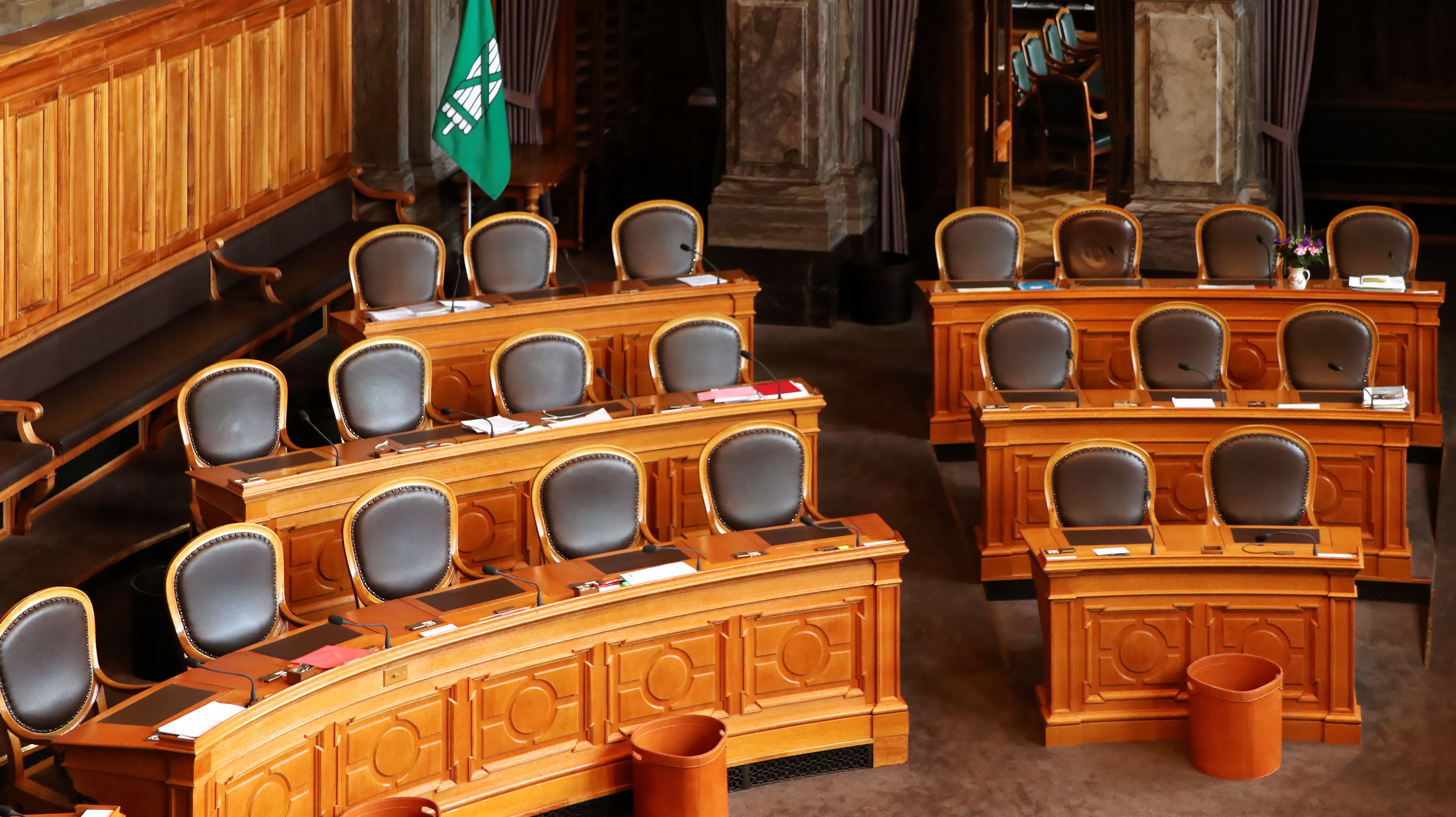 Bilder vom Besuch der Teilnehmer des WikiAlpenforums (WAF) am 2. Juni 2018 im Bundeshaus in Bern